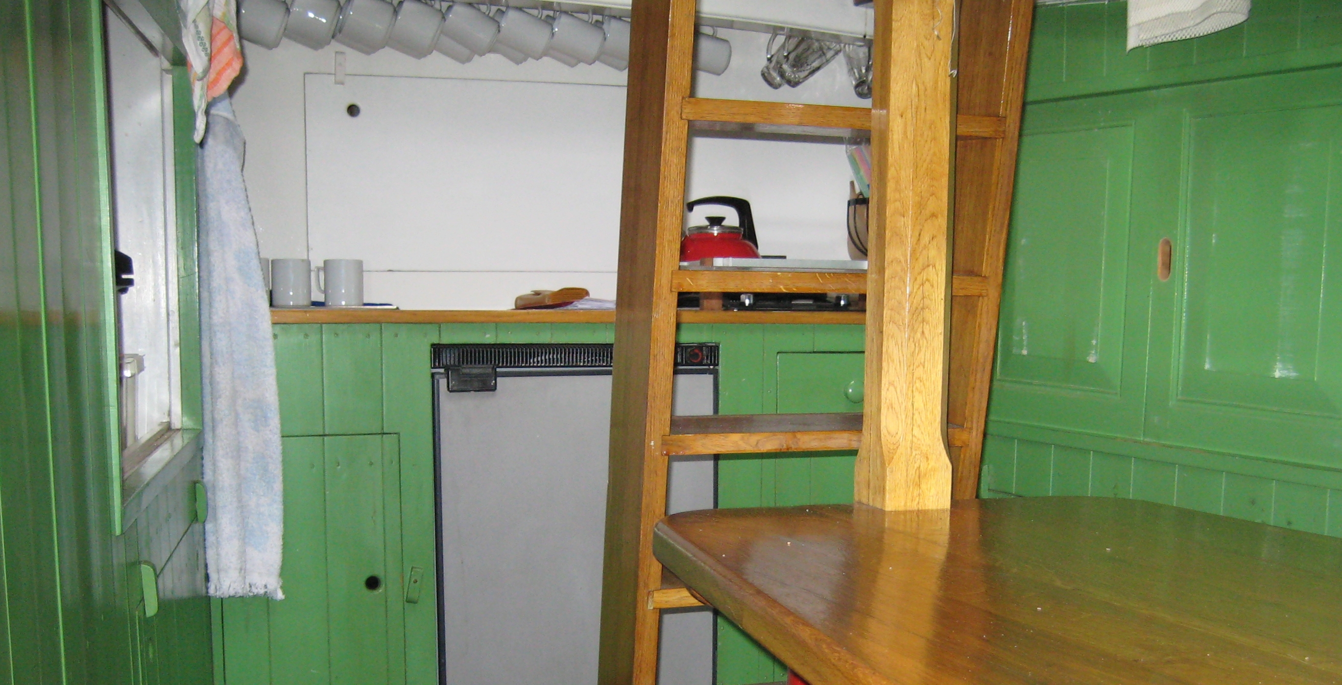 Das älteste fahrtüchtige Segelschiff Deutschlands, die Rigmor von Glueckstadt, Störschipperfest Itzehoe